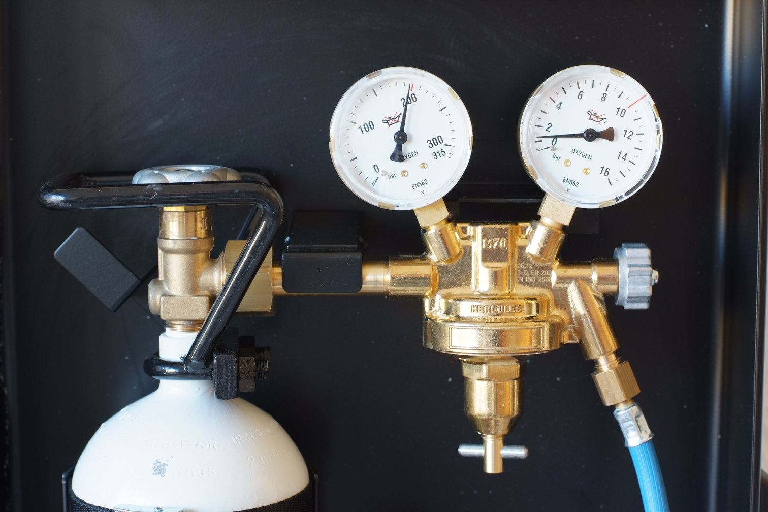 einstellbares Sauerstoffventil mit Manometern eines Hartlötgeträts